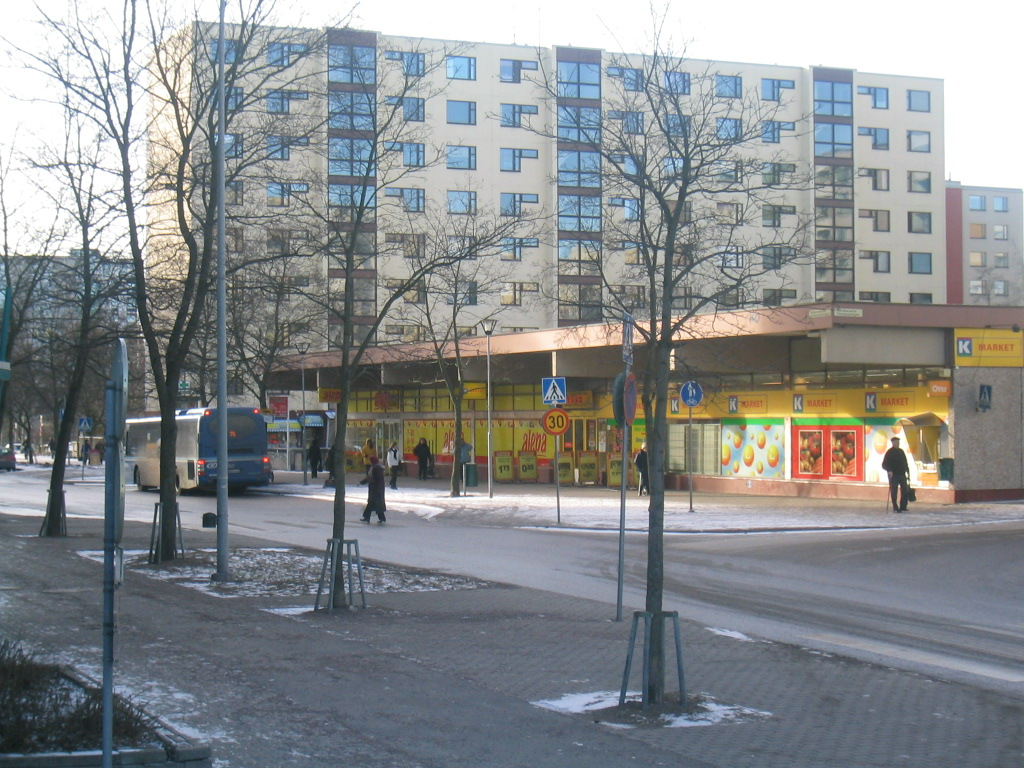 Pihlajiston ostoskeskus